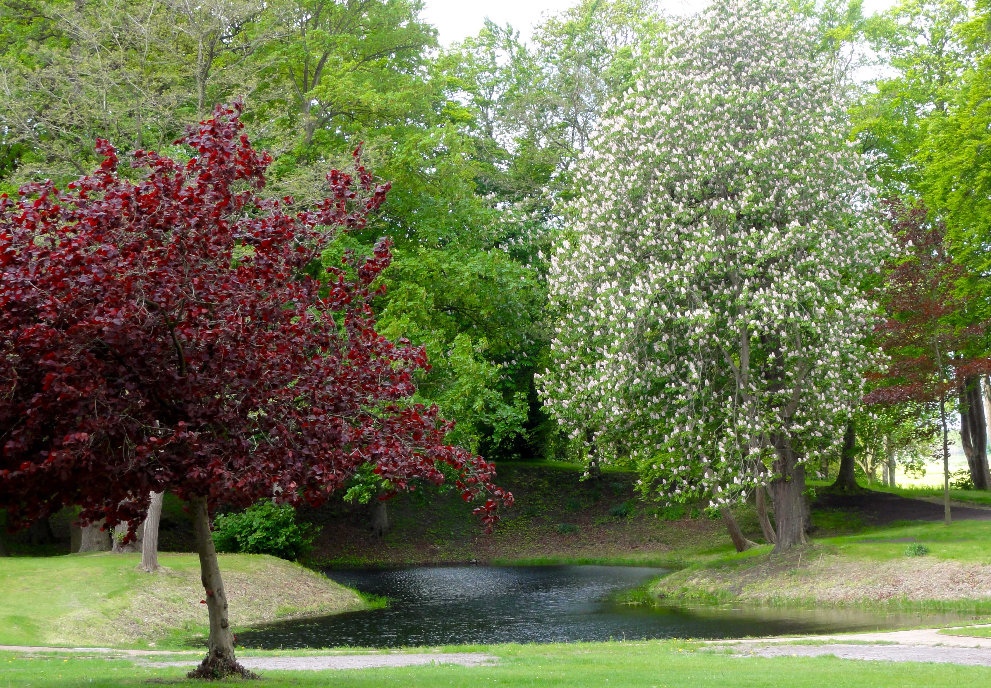 Tuin van de voormalige hervormde pastorie Noorderstraat 1 Noordbroek